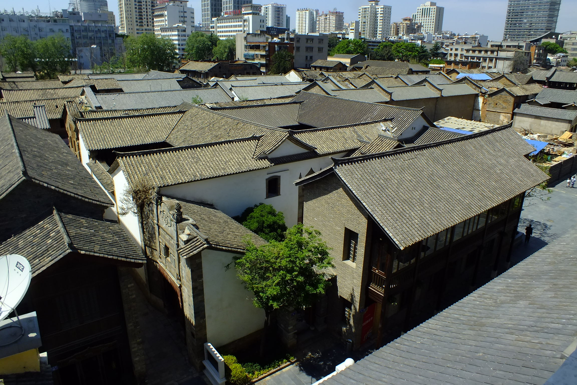 2015-03-20 Wuhua District, Yunnan, Kunming(雲南省昆明市五華区, 中国)